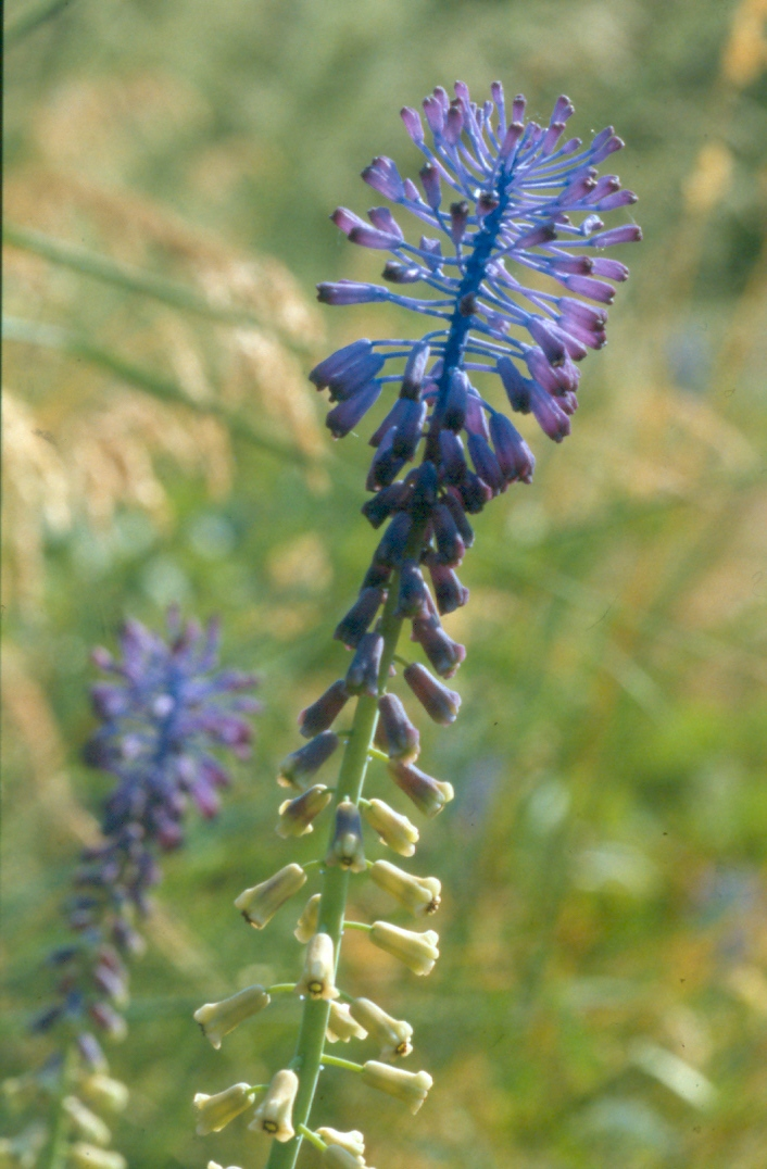 Leopoldia tenuiflora (Muscari tenuiflorum) Aufnahmeort: Seewinkel, Burgenland, Austria